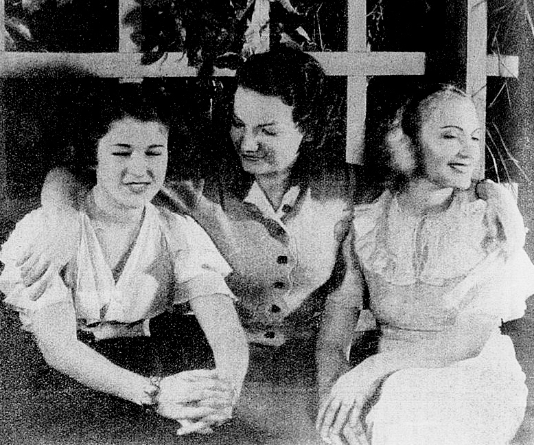 Carmen Miranda (ao centro) e as irmãs Jeanette Weyting e Dulce Weytingh no filme Estudantes, 1935. Foto publicada na revista brasileira A Scena Muda em 25 de Junho de 1935.